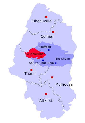 Lage von Kanton Guebwiller im Arrondissement Guebwiller und im Département Haut-Rhin.